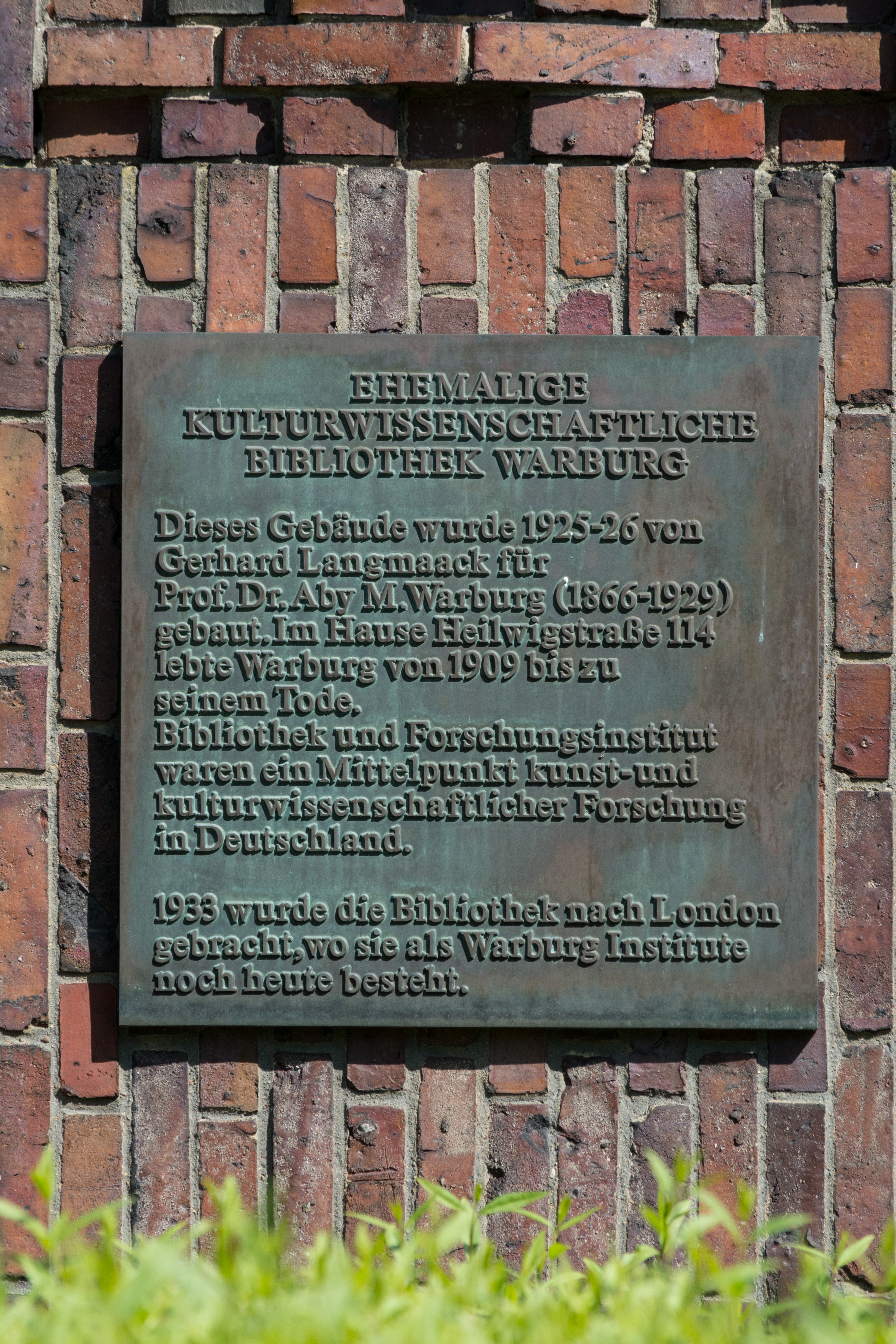 Tafel am Gebäude der Kulturwissenschaftlichen Bibliothek Warburg, Heilwigstraße 116 in Hamburg-Eppendorf. This is a photograph of an architectural monument.